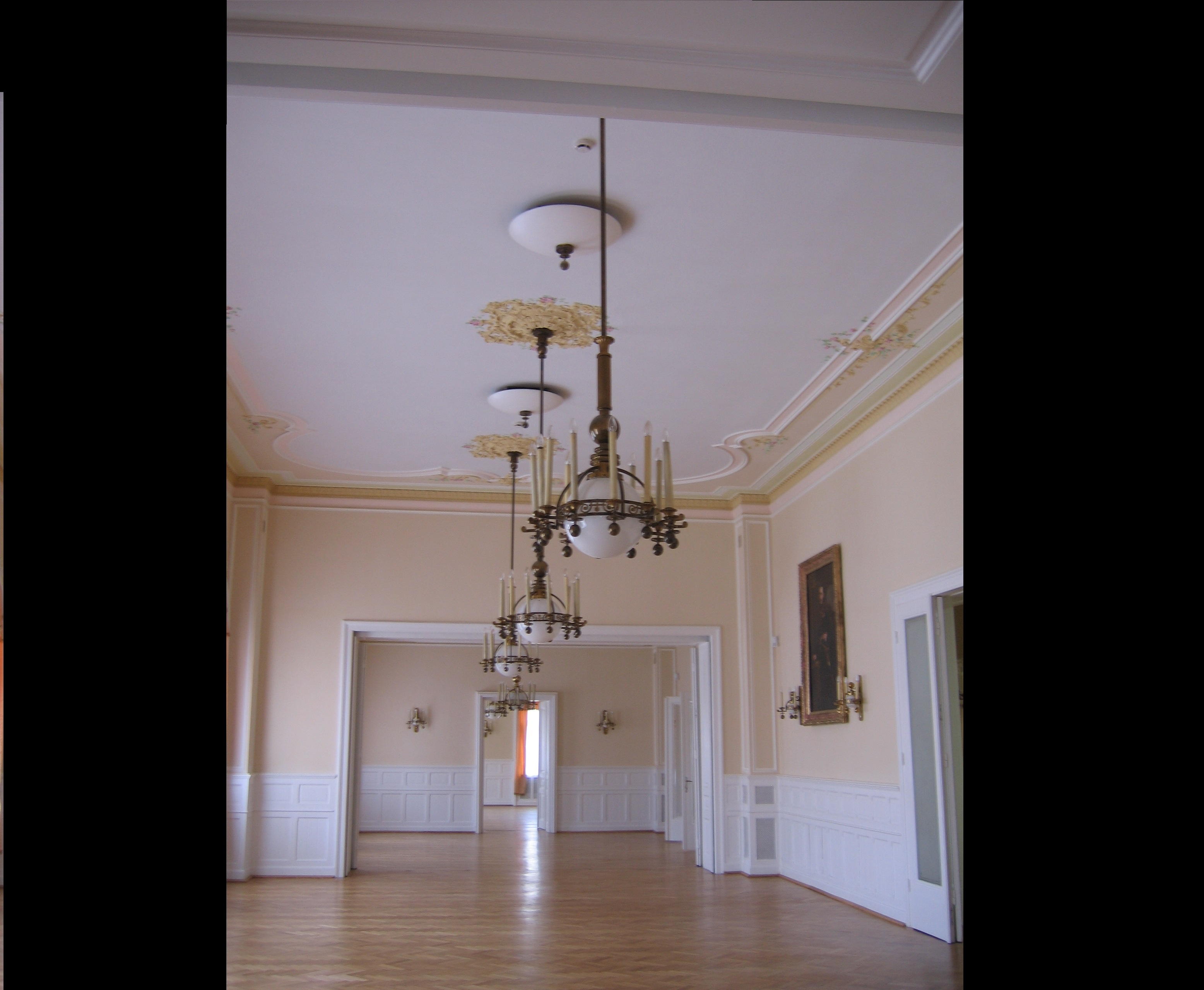 Az Ózdi Kaszinó Díszterme